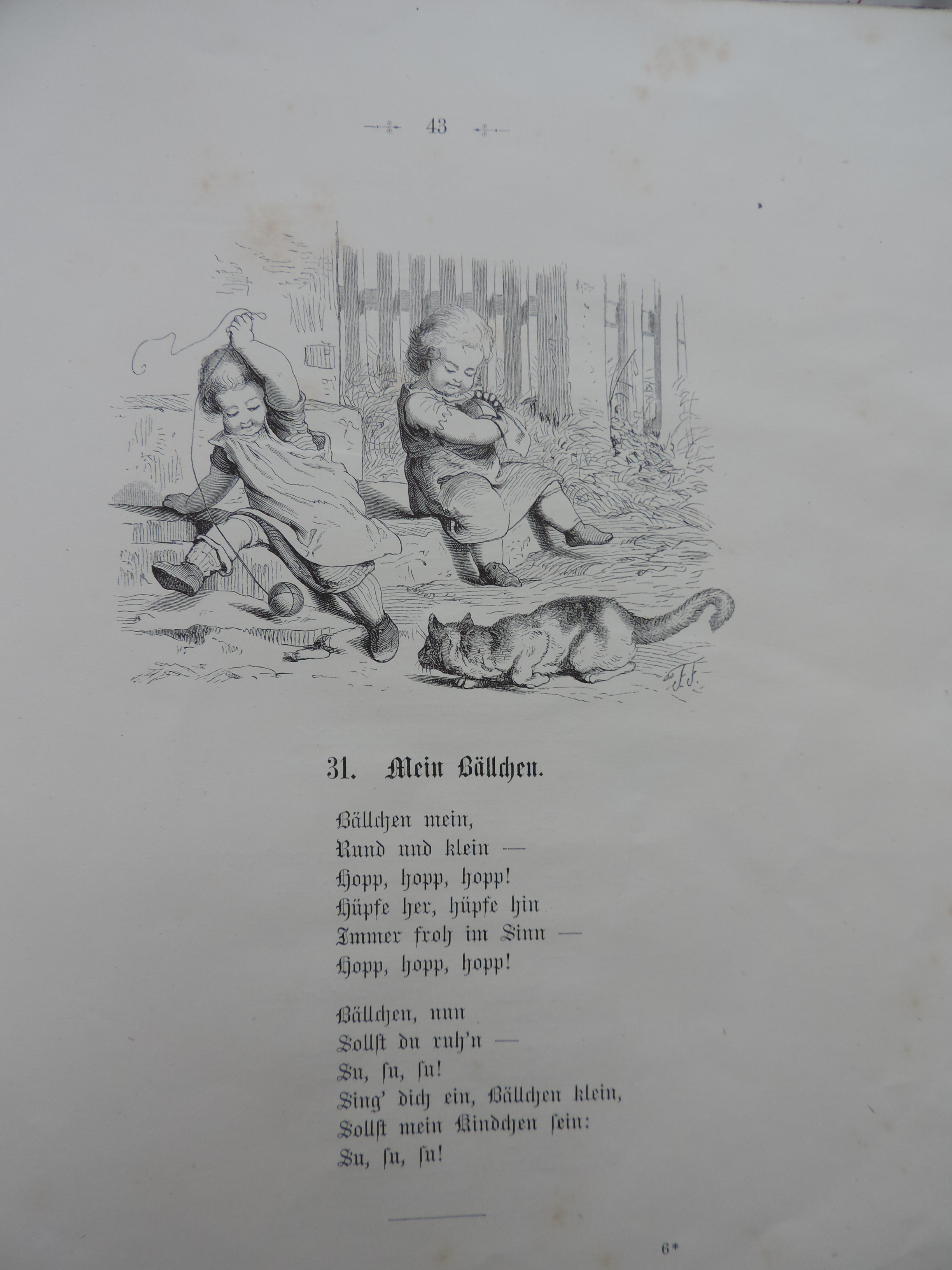 Fröbel's Mutter- und Koselieder